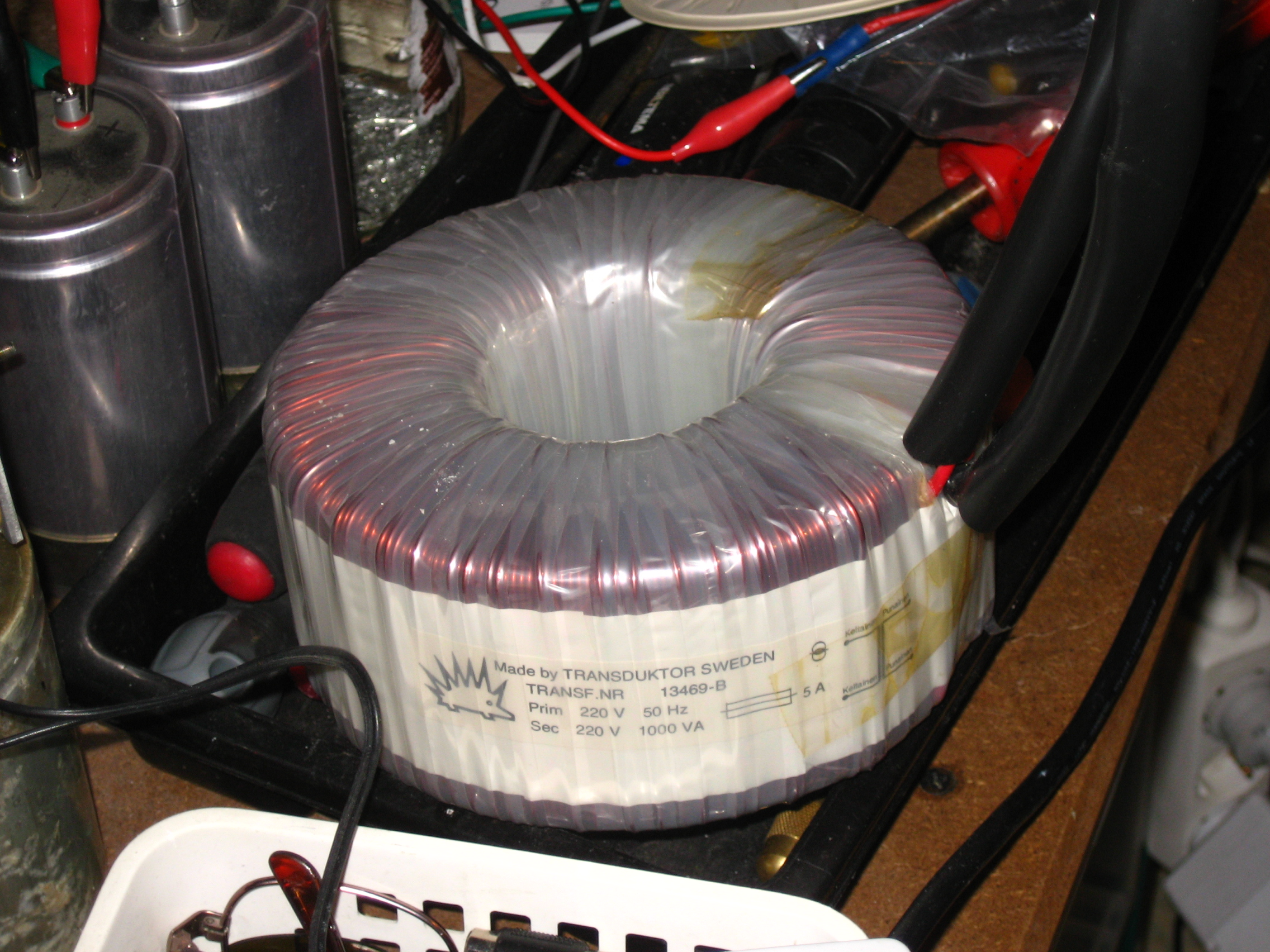 1000VA Suojaerotusmuuntaja 220V jännitteelle